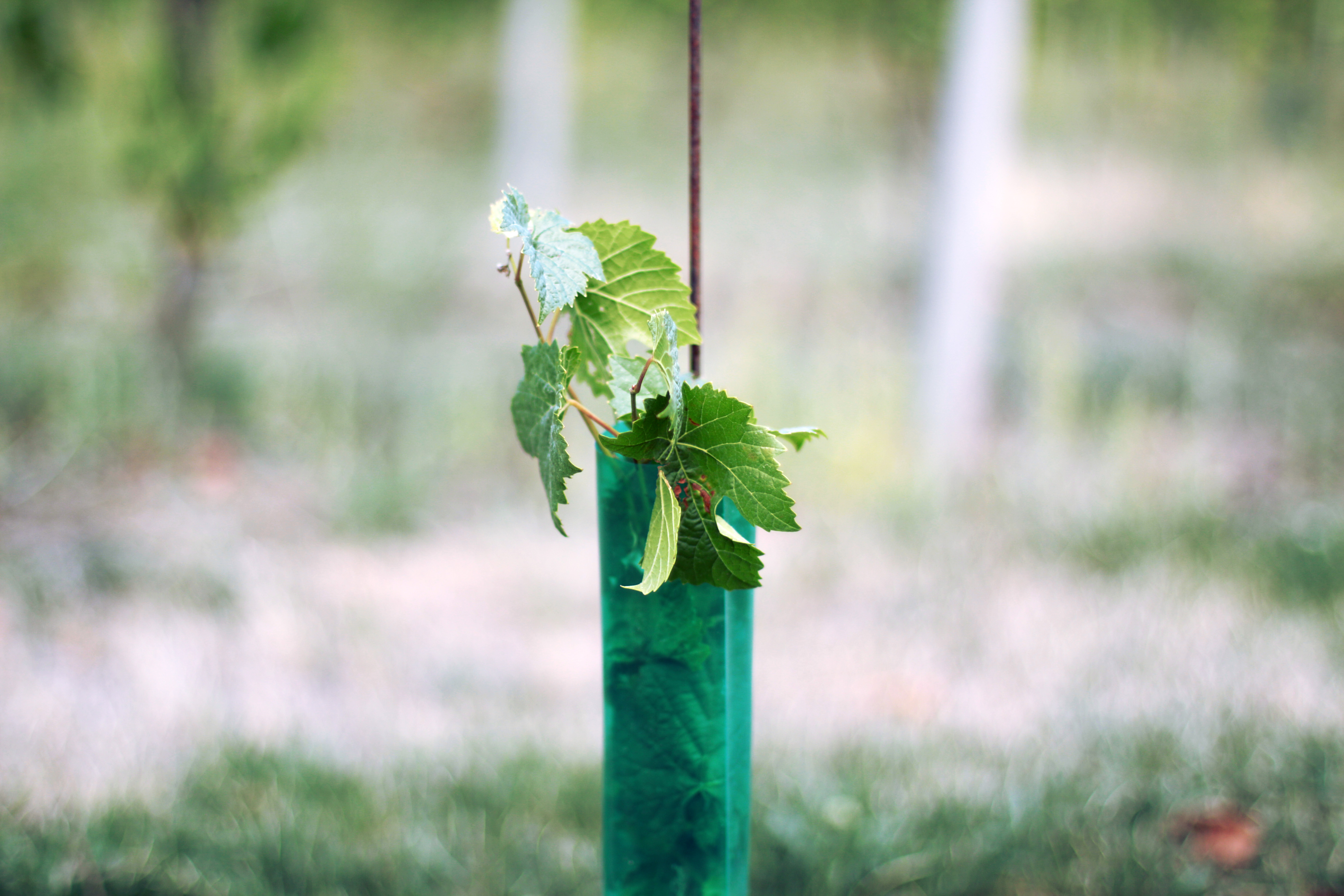 Jeune plan de vigne et sa protection plastique